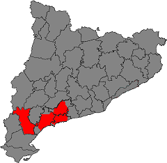 Àrea de la Denominació d'Origen Tarragona